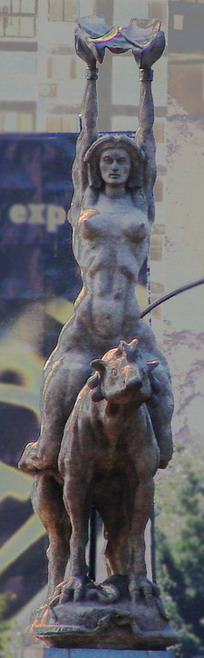 Escultura de María Lionza ubicada en la Autopista Francisco Fajardo en Caracas; la obra original de Alejandro Colina amaneció francturada en junio de 2004. La ruptura se produjo a nivel de la cintura de la heroína, desplomándose toda su parte superior. María Lionza representa el culto aborigen y matriarcal de muchos venezolanos. Si tiene curiosidad en profundizar sobre el tema dejo dos links: .ve/ElizabethPazos/PresentacionElizabethPazo...